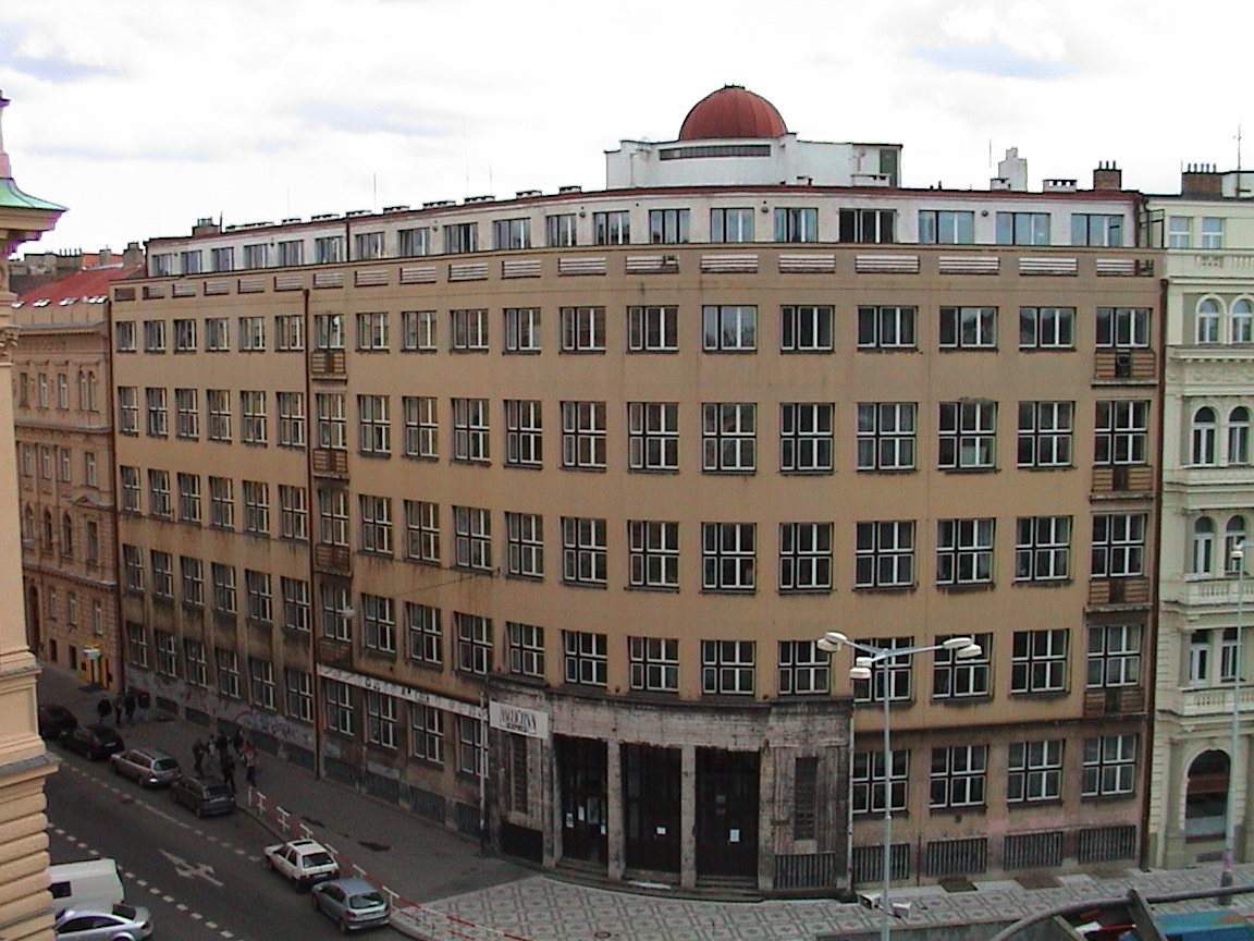 Pohled na Arcibiskupské_gymnázium_v_Praze z Náměstí míru, severozápadní strana